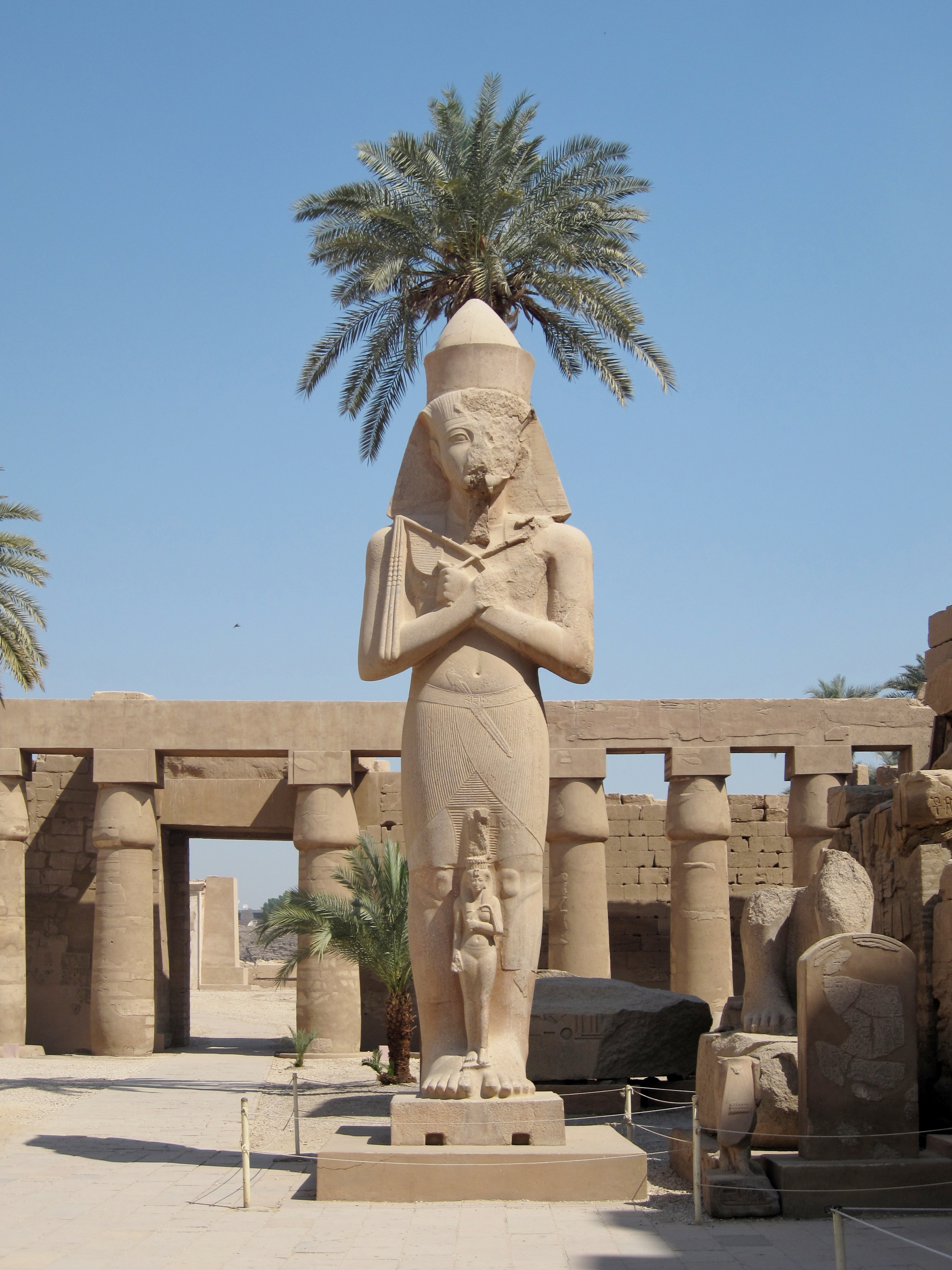 Von Pinudjem I. usurpierte Statue Ramses’ II. im Tempel von Karnak, nördlich von Luxor, Ägypten